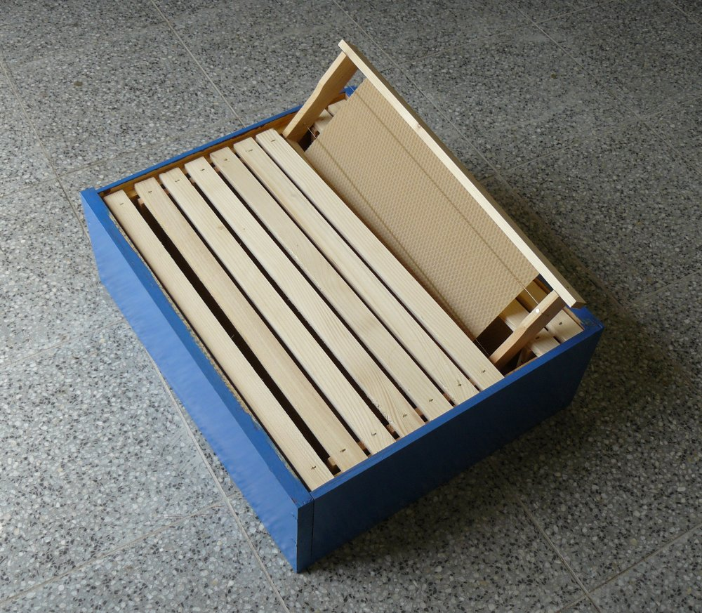 Langstrothův nízký nástavek připravený pro přidání do úlu